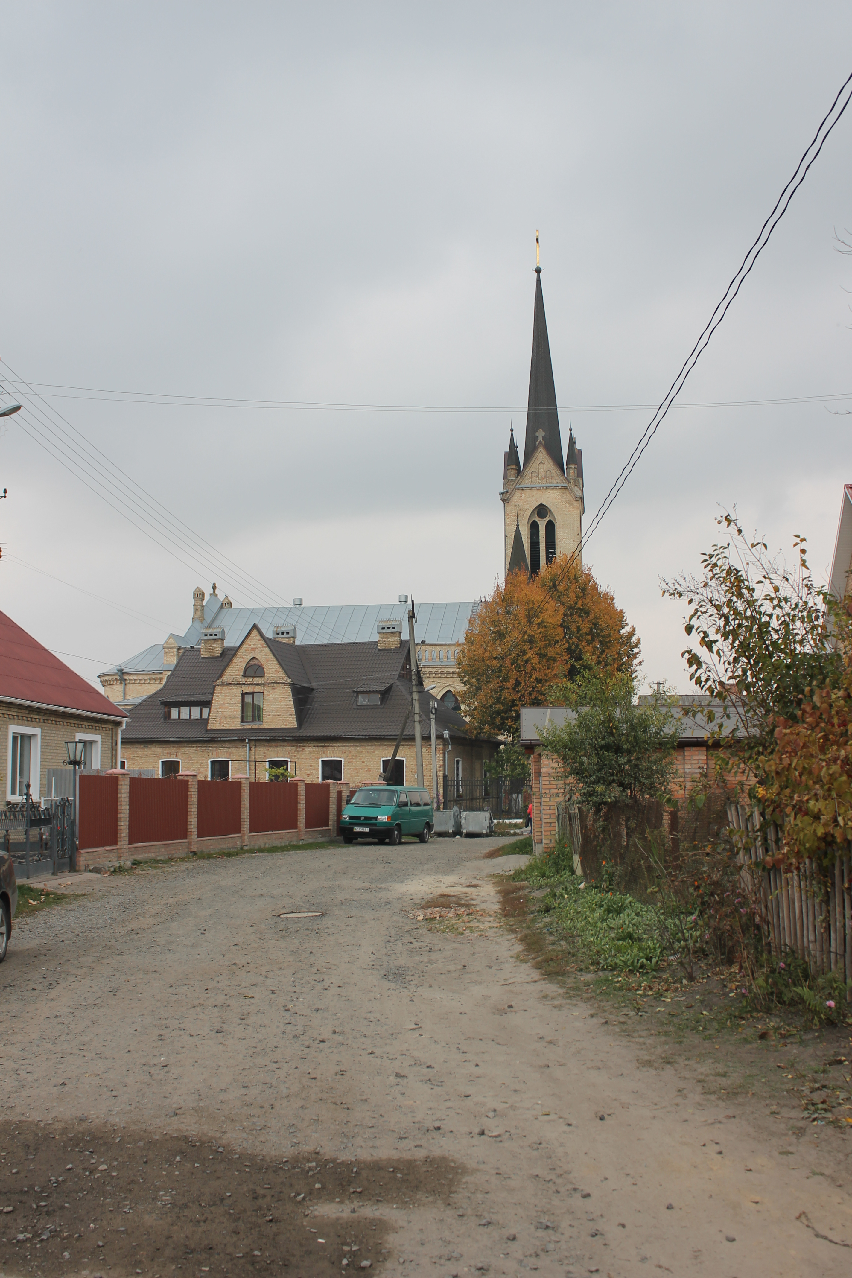 Будинок пастора та кірха у Луцьку